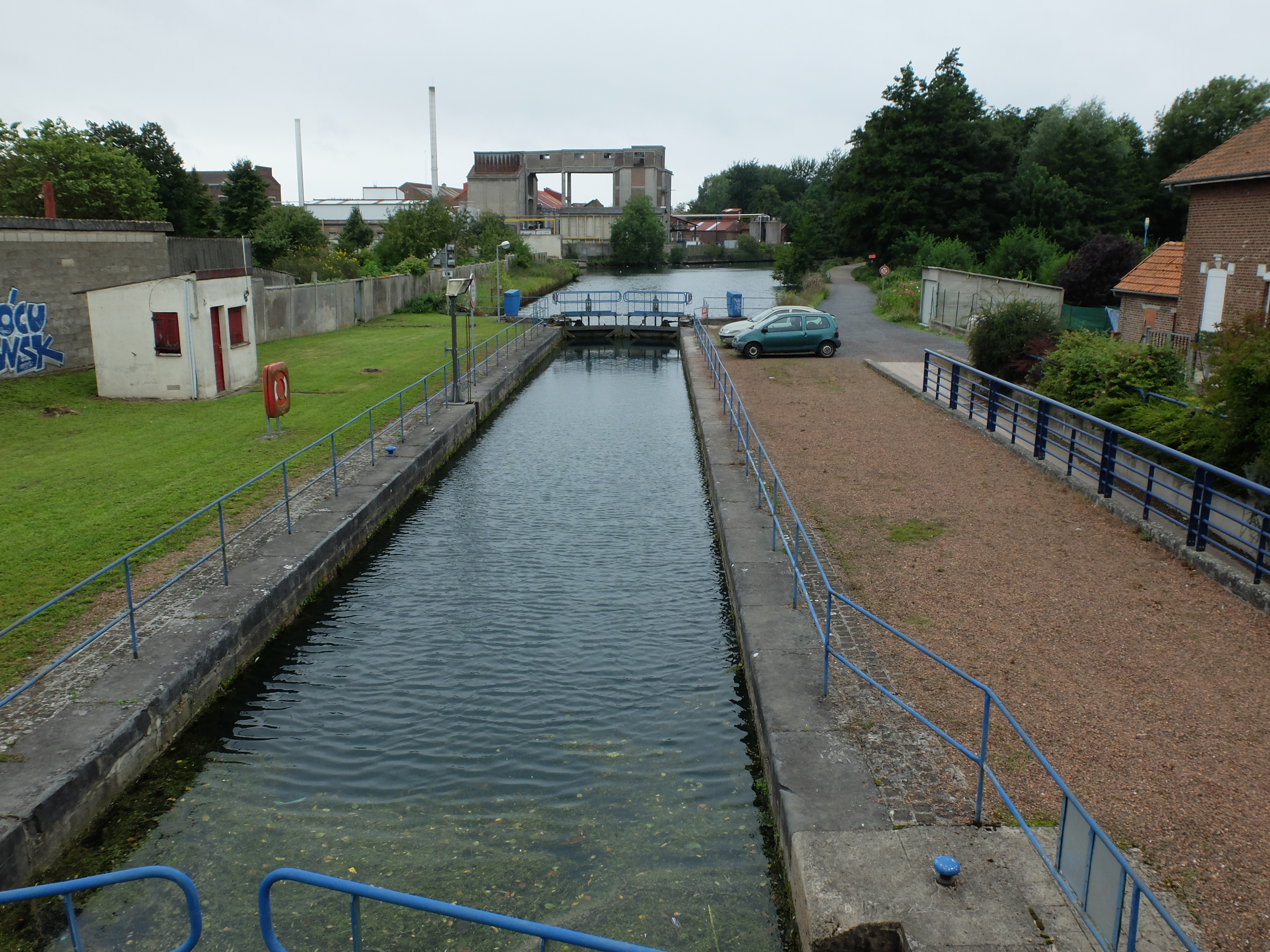 Vue de la Scarpe à Saint-Laurent-Blangy.